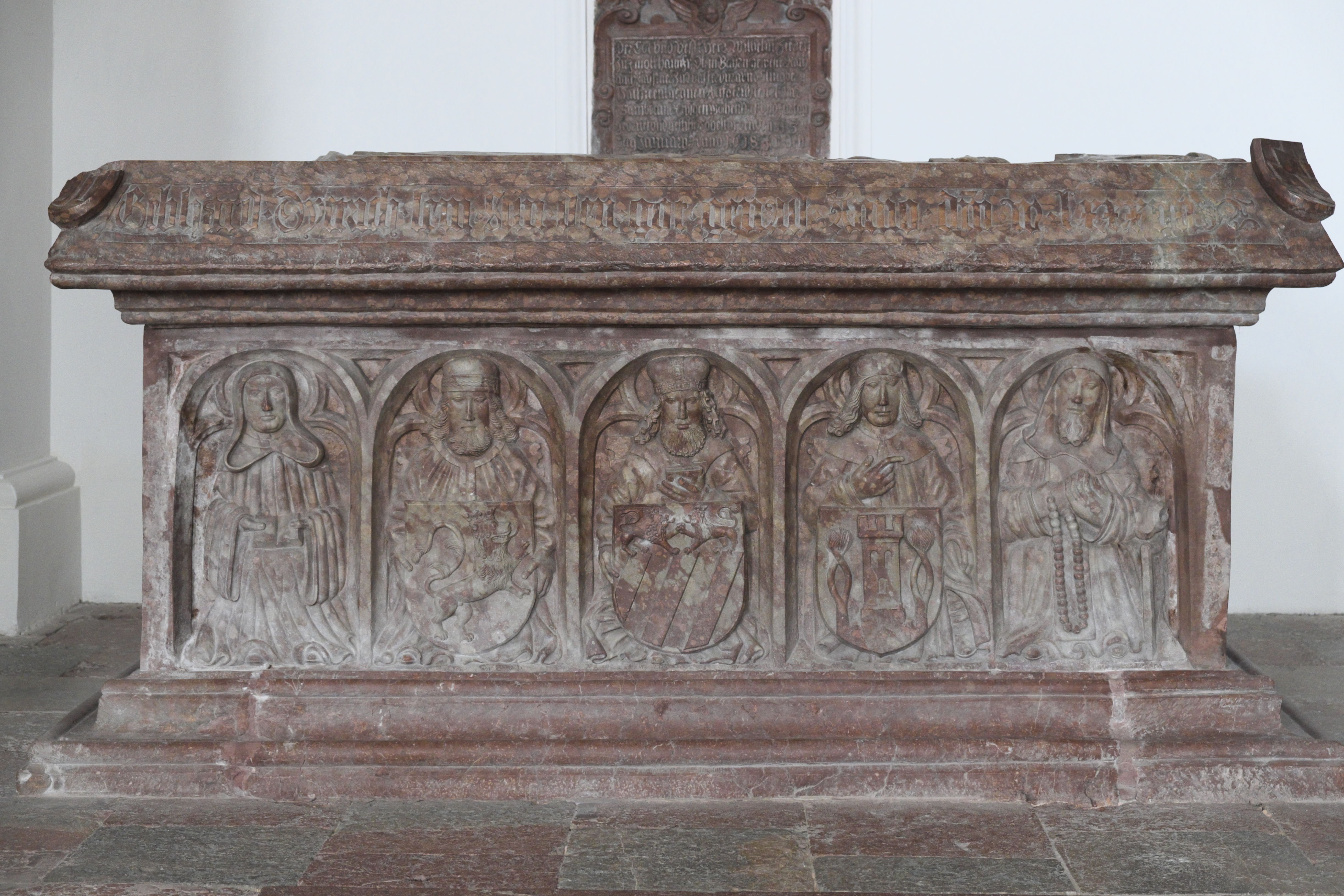 Ehemalige Benediktinerklosterkirche des Klosters Attel in Attel (Wasserburg am Inn) im Landkreis Rosenheim (Bayern/Deutschland), Hochgrab des Stifters Engelbrecht von Limburg, von 1509